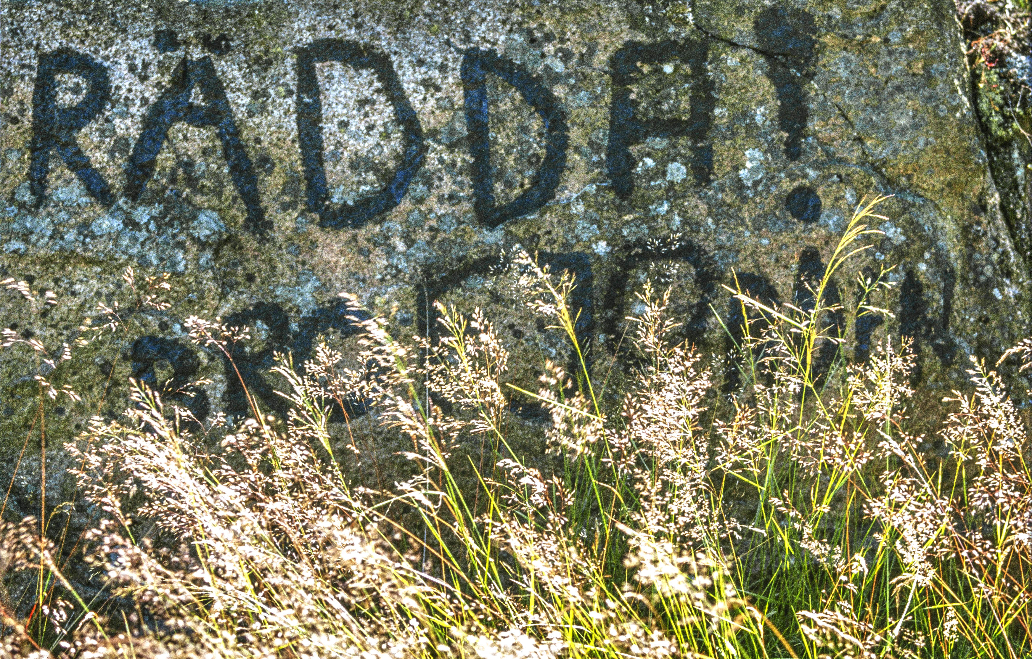 "Rädda Brofjorden" står det på en bergshäll i Lahälla mitt emot oljeraffinaderiet Preemraff i Brofjorden i Bohuslän. Klottret syftar på byggande av oljeraffinaderiet på 1970-talet.